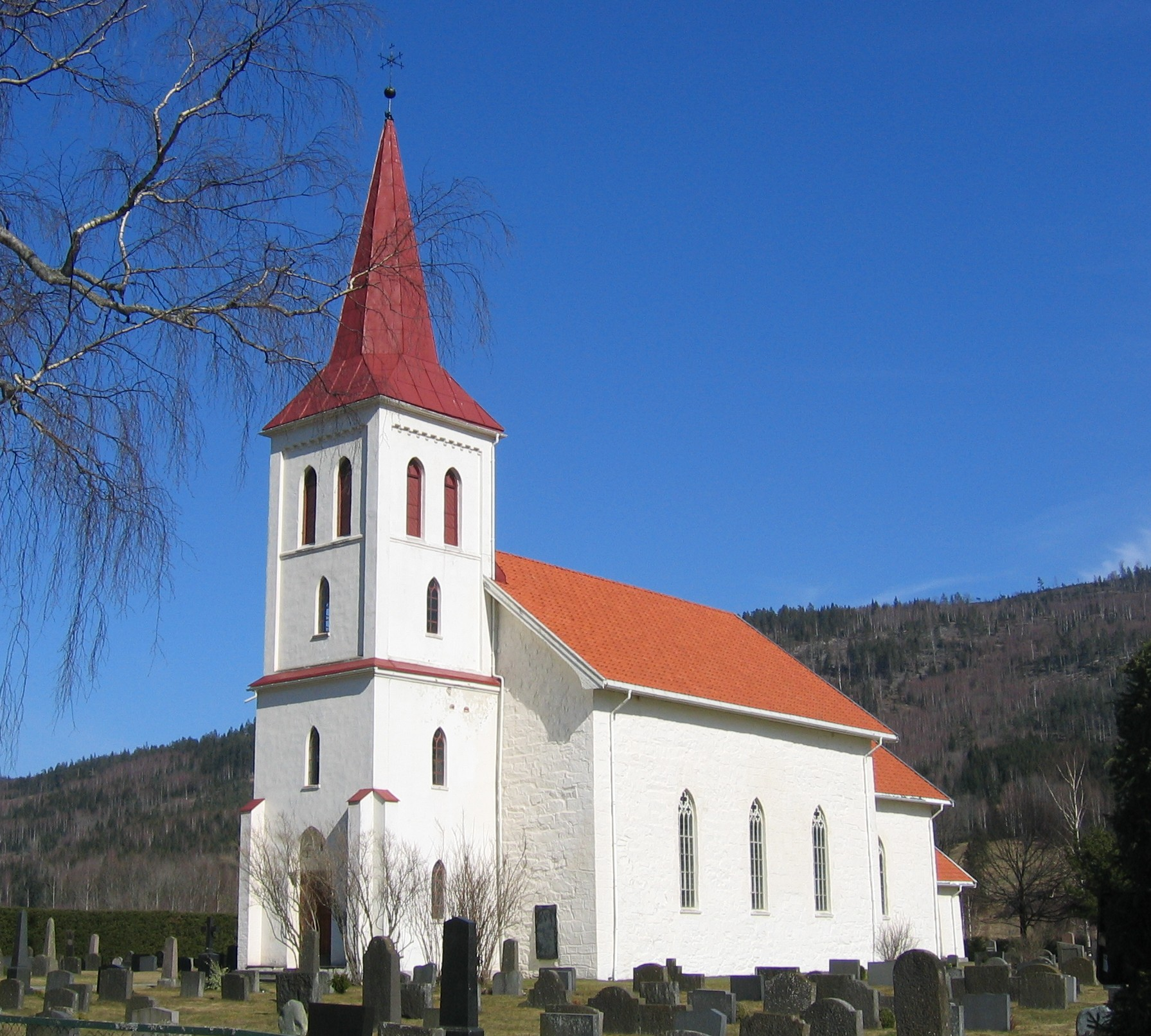 Efteløt kirke, Efteløt church, Kongsberg